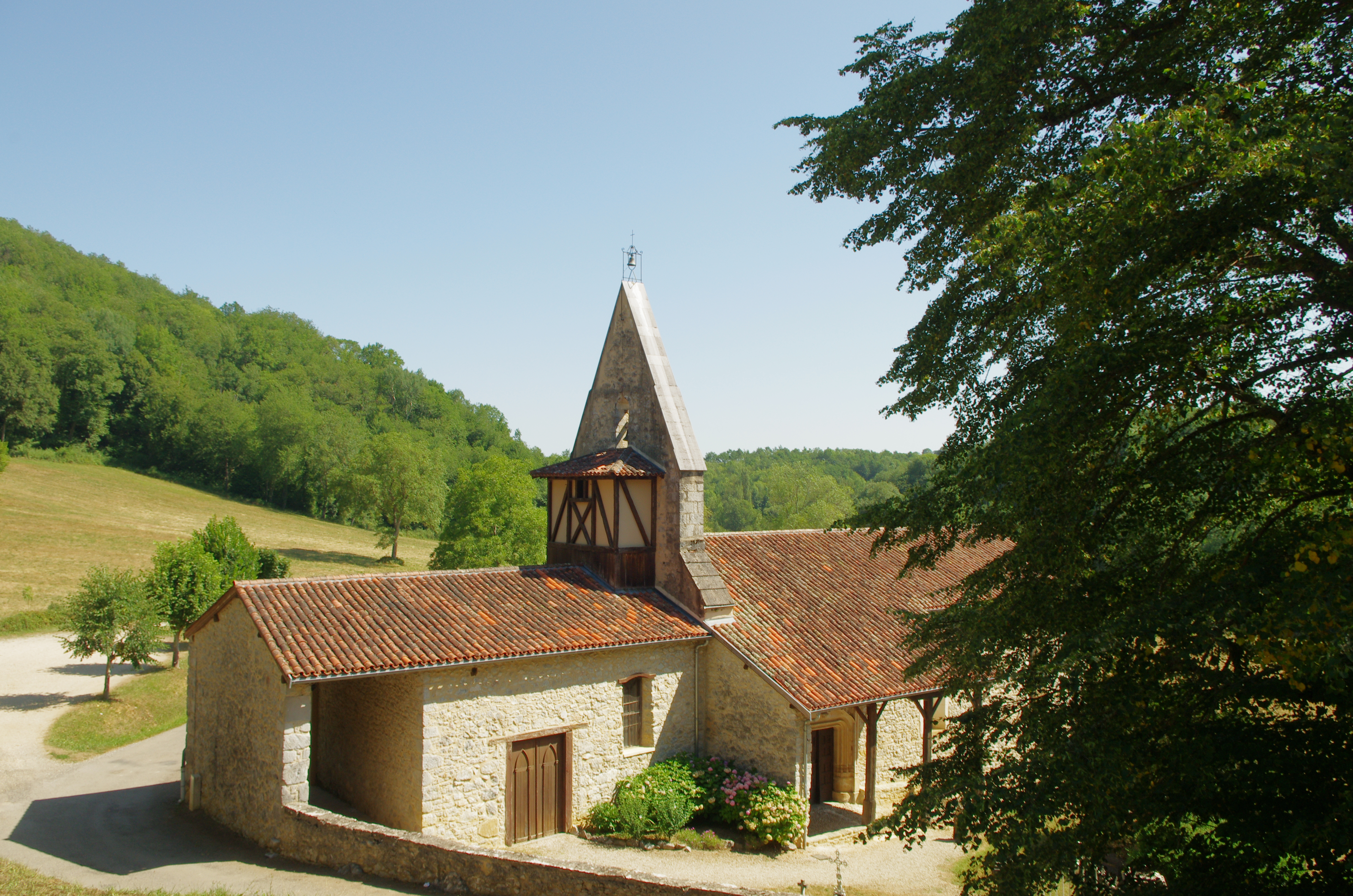 Chapelle Saint-Paul